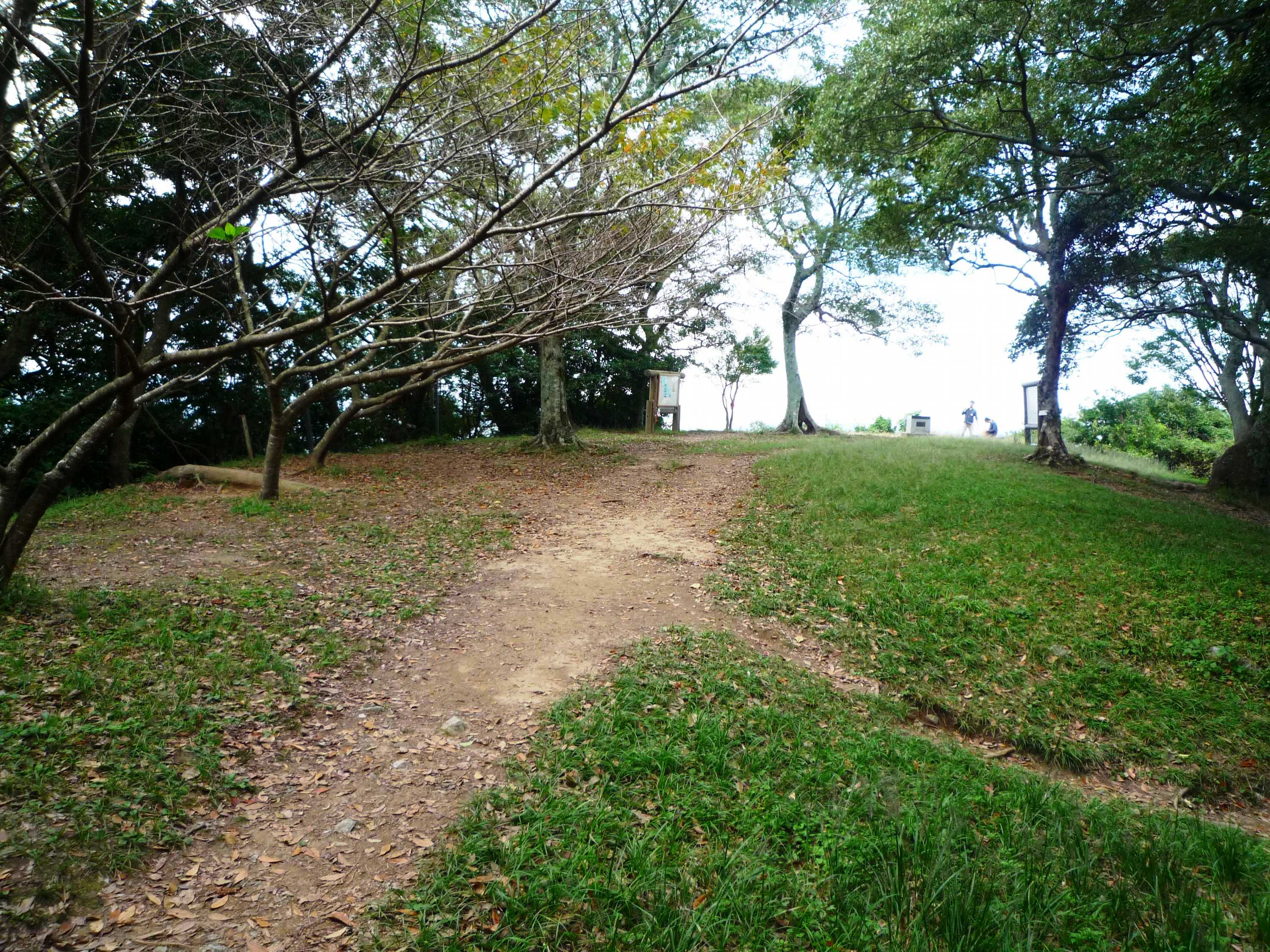 立花山城跡（山頂）